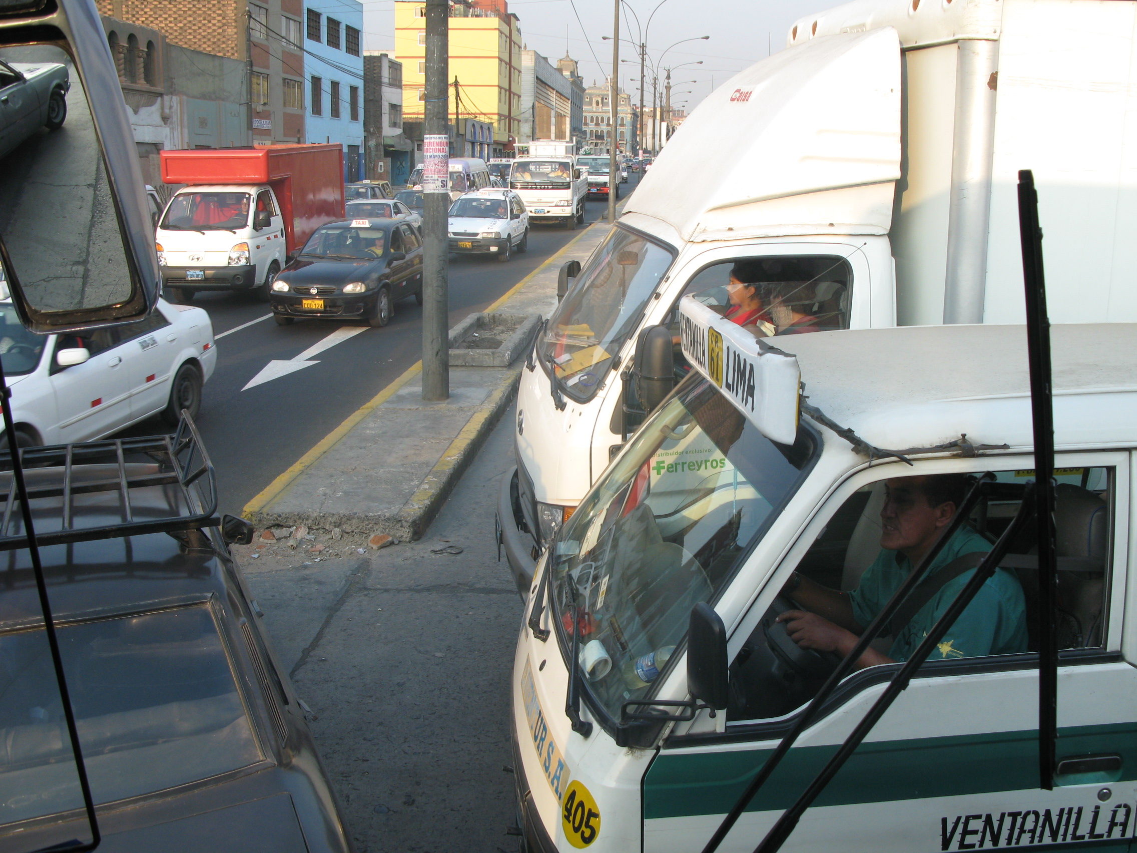 Kaotičen promet v Limi